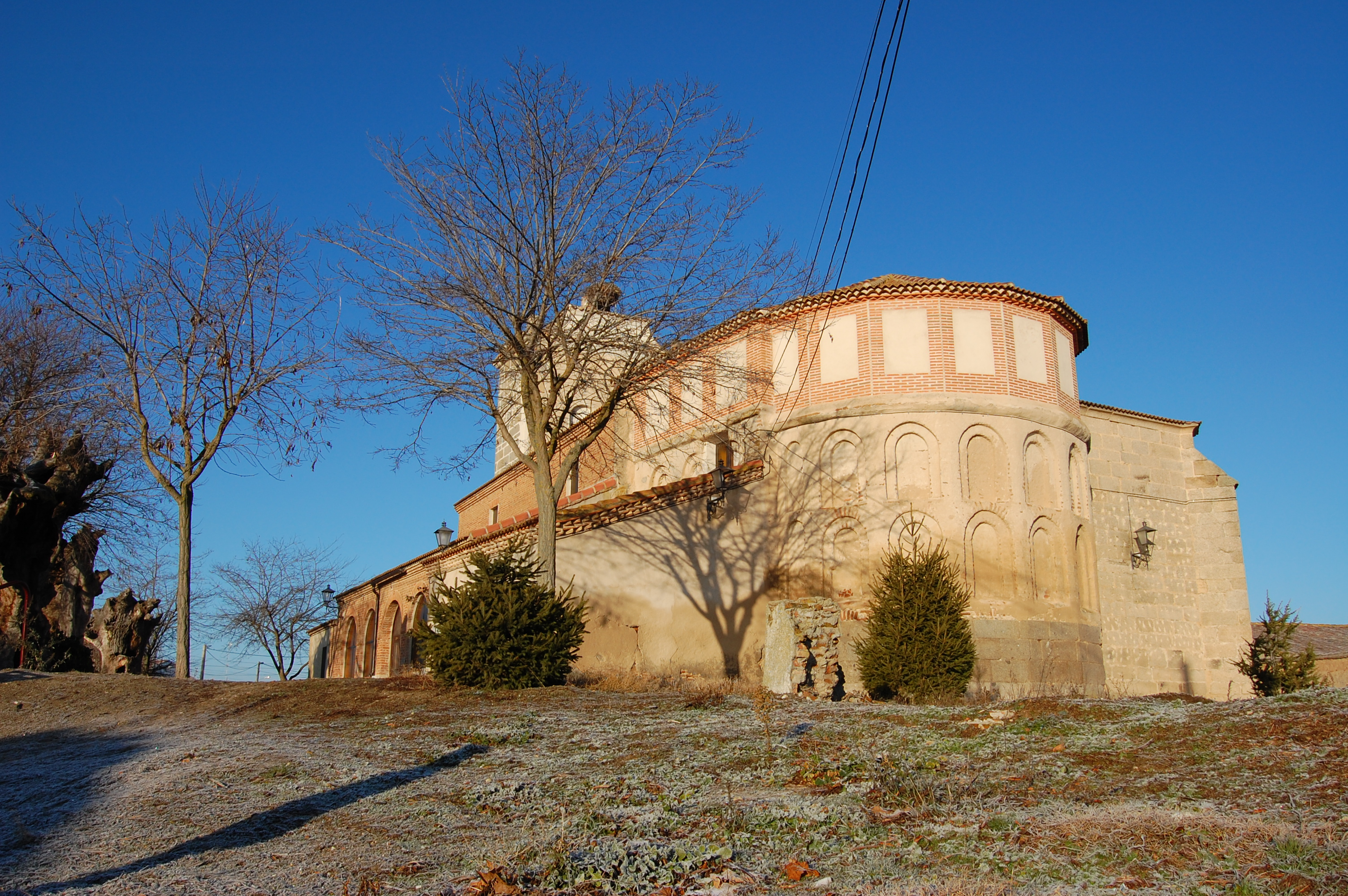 Foto de la Iglesia de Nava de Sotrobal